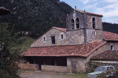 San Andres ermita Astigarribian.